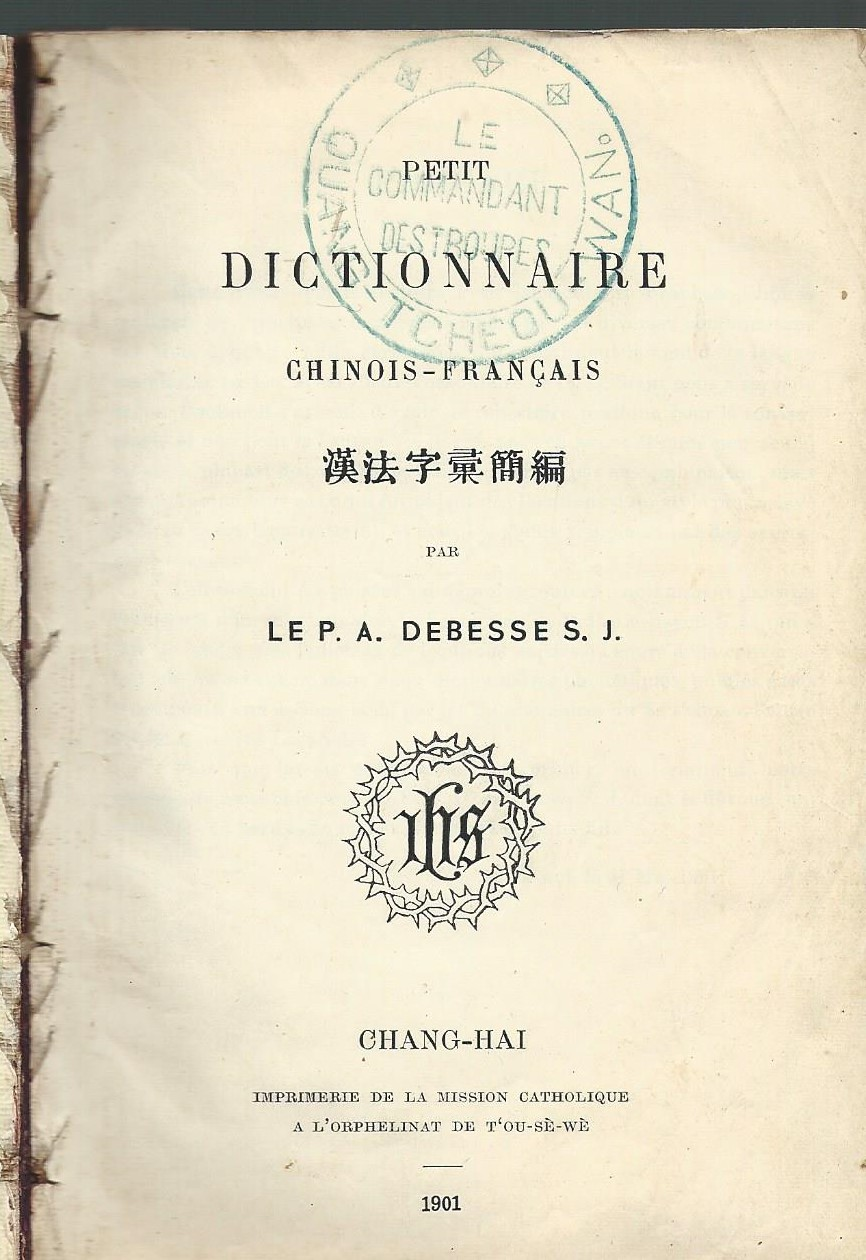 Page de garde du dictionnaire Debesse